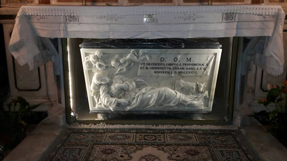 Urna contenente le reliquie di Santa Trofimena, Minori (SA)